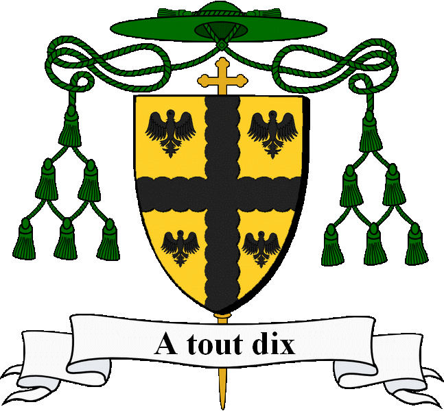 En aour e groaz koñchek en sabel, heuliet gant pevar ererig ivez en sabel